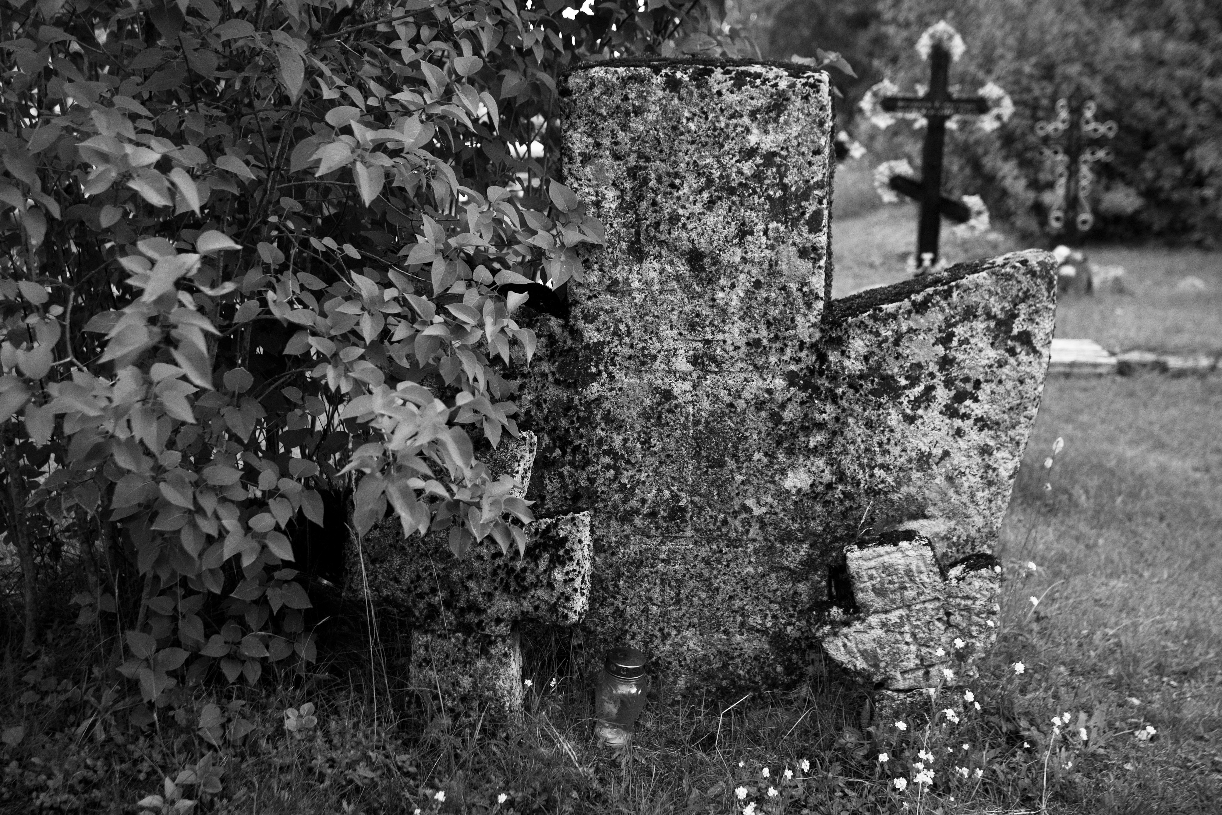 Liivakivist ristid Podmotsa küla kalmistul Värska vallas Setumaal. Mälestised nr 5598, 5599 ja 5600.